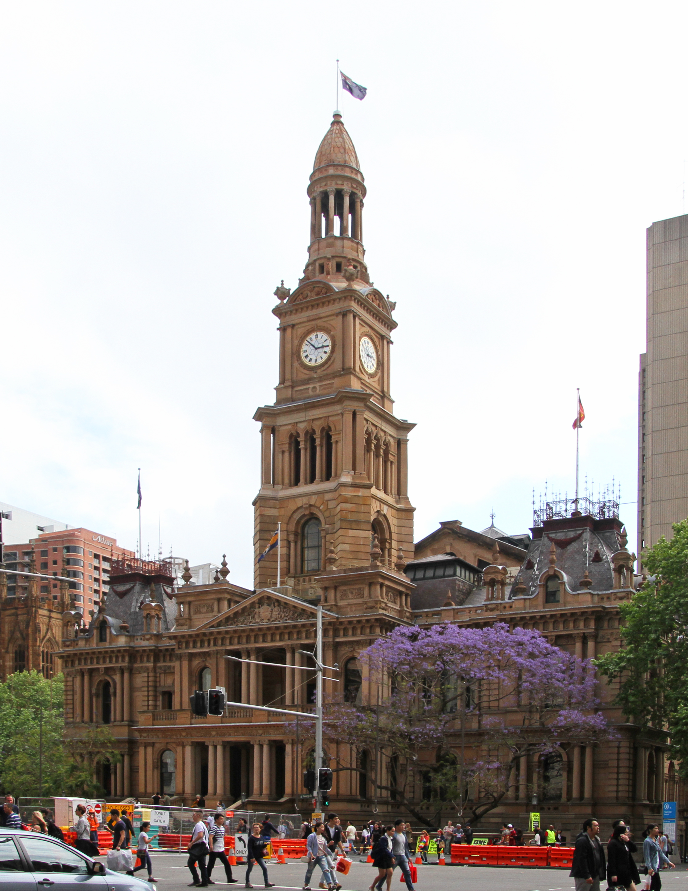 Sydney Town Hall 2